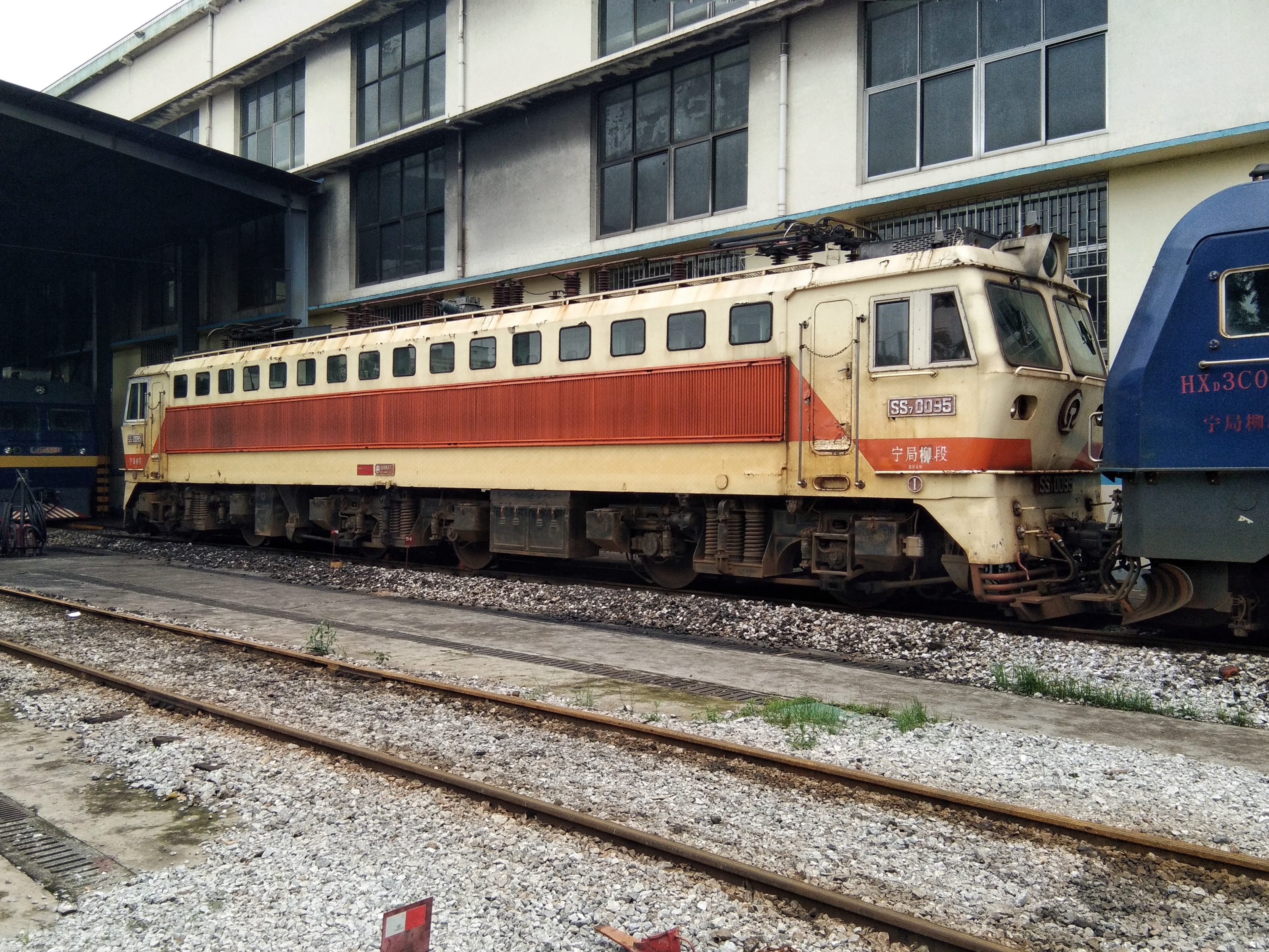 0095号韶山7型电力机车是此型机车中第一台采用标准化司机室的机车。但从此台机车I端右侧视角来看，II端司机室侧窗变为非标准化司机室韶山7型电力机车样式。